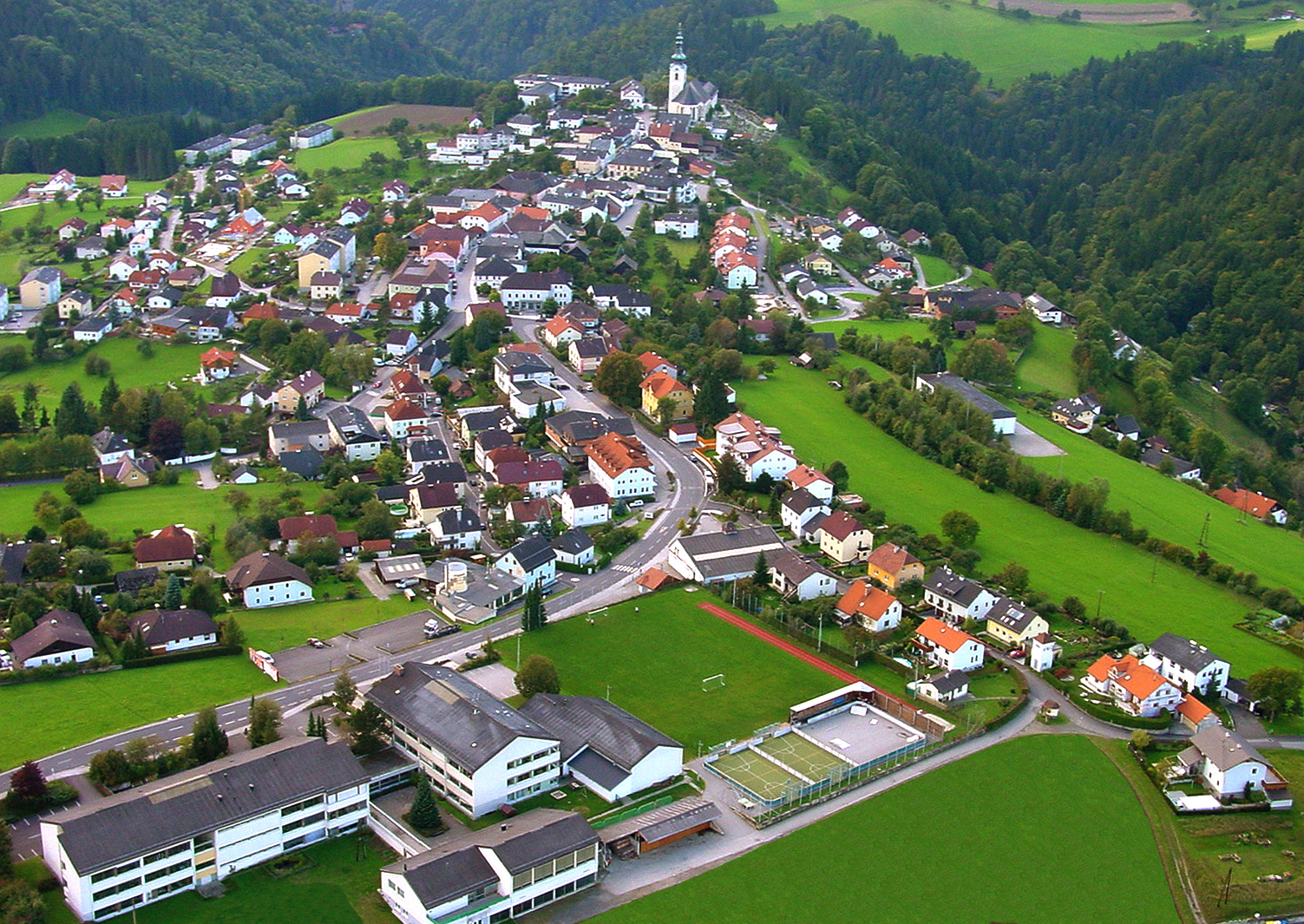 Gramastetten